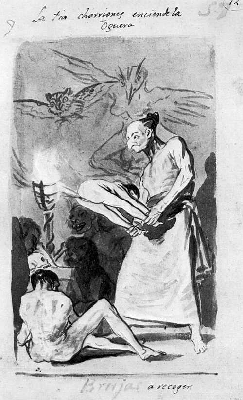 Dibujo nº 57 del Álbum B o de Madrid. También sirvió como preparatorio del capricho nª 69.